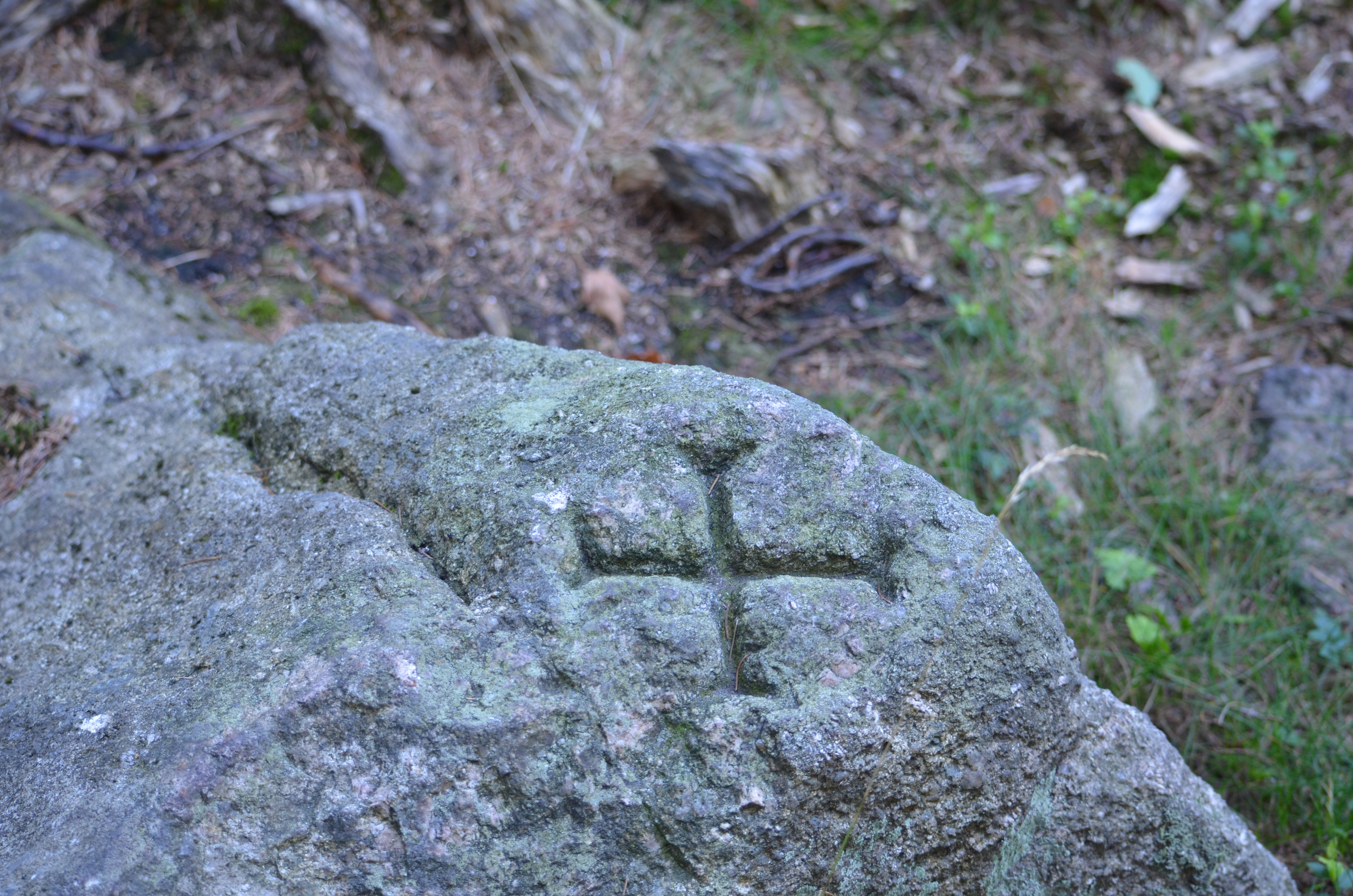 granicznik wykuty w skale